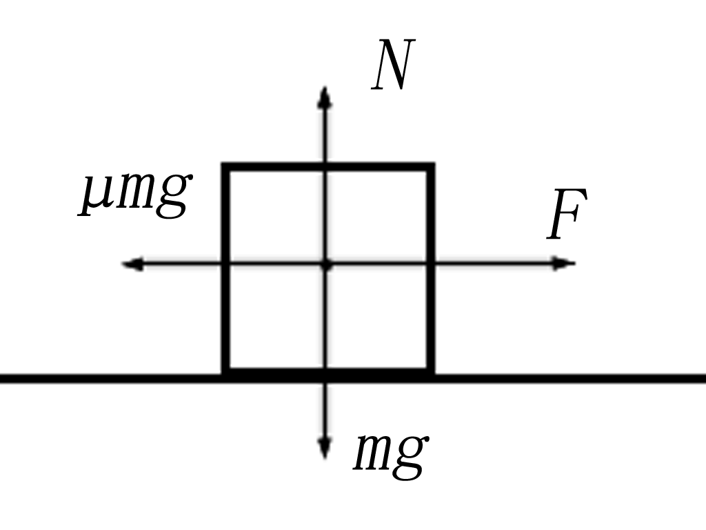 量纲页面的一个简单的举例